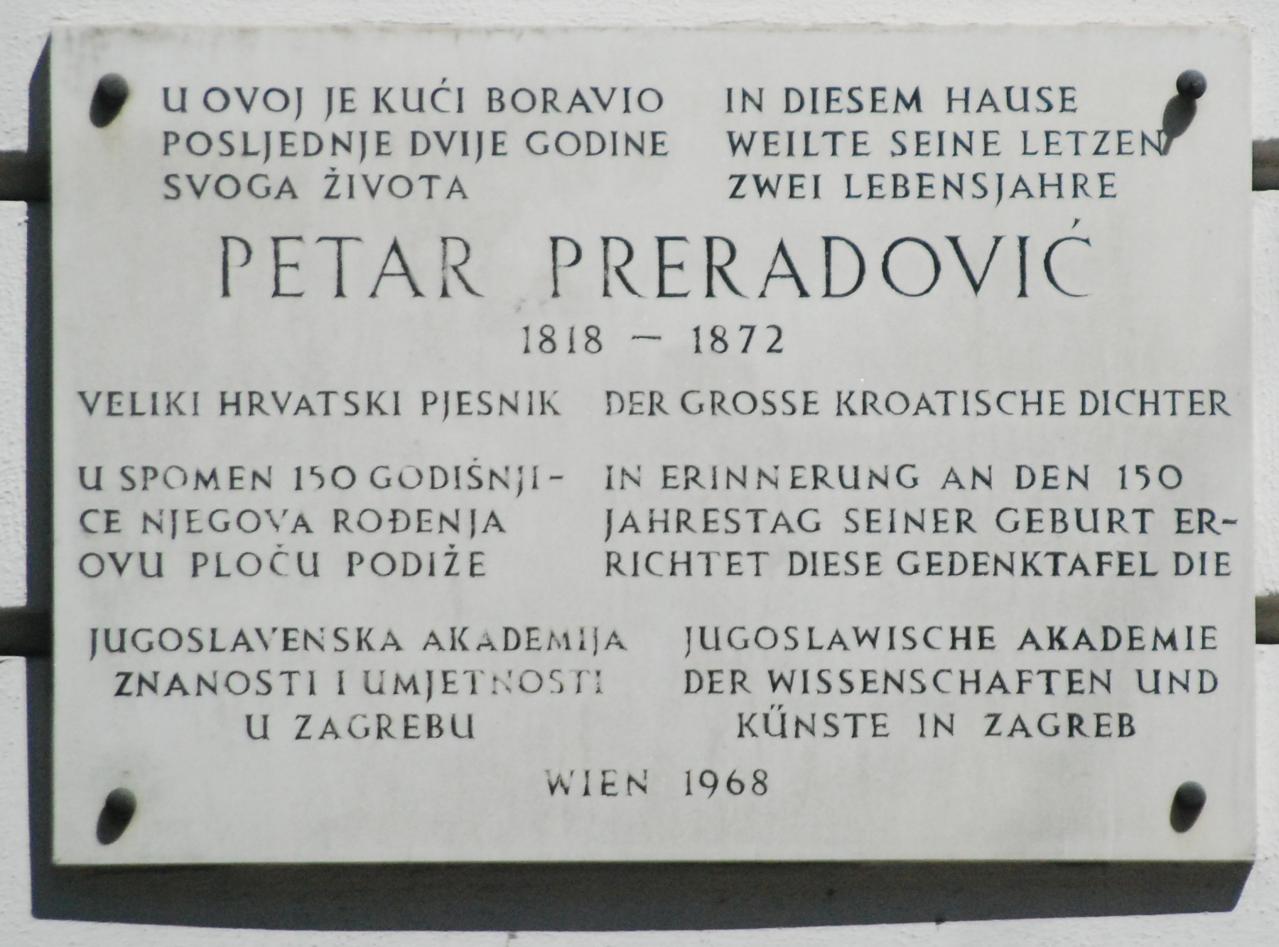 Gedenktafel für Petar Preradović in der Ungargasse 39 in Wien-Landstraße; enthüllt am 18. September 1968.